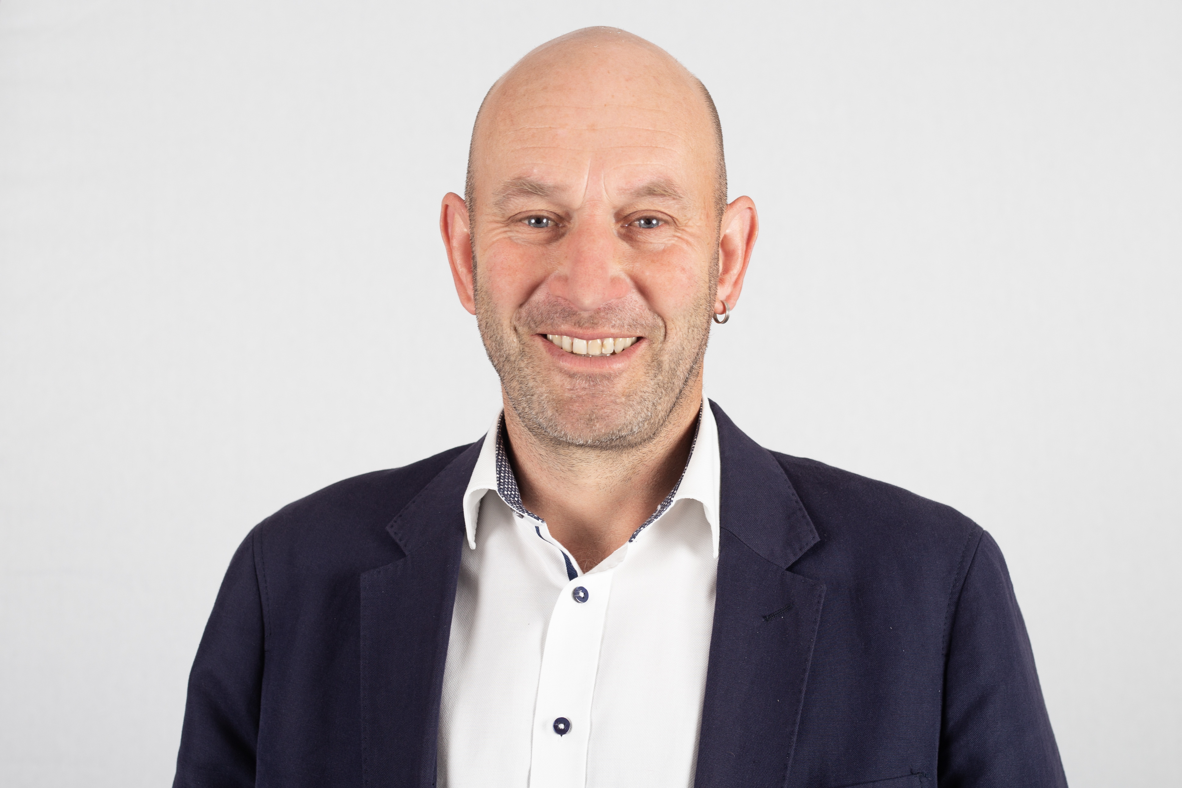 Wolfgang Aldag, MdL Sachsen-Anhalt, B90/Grüne